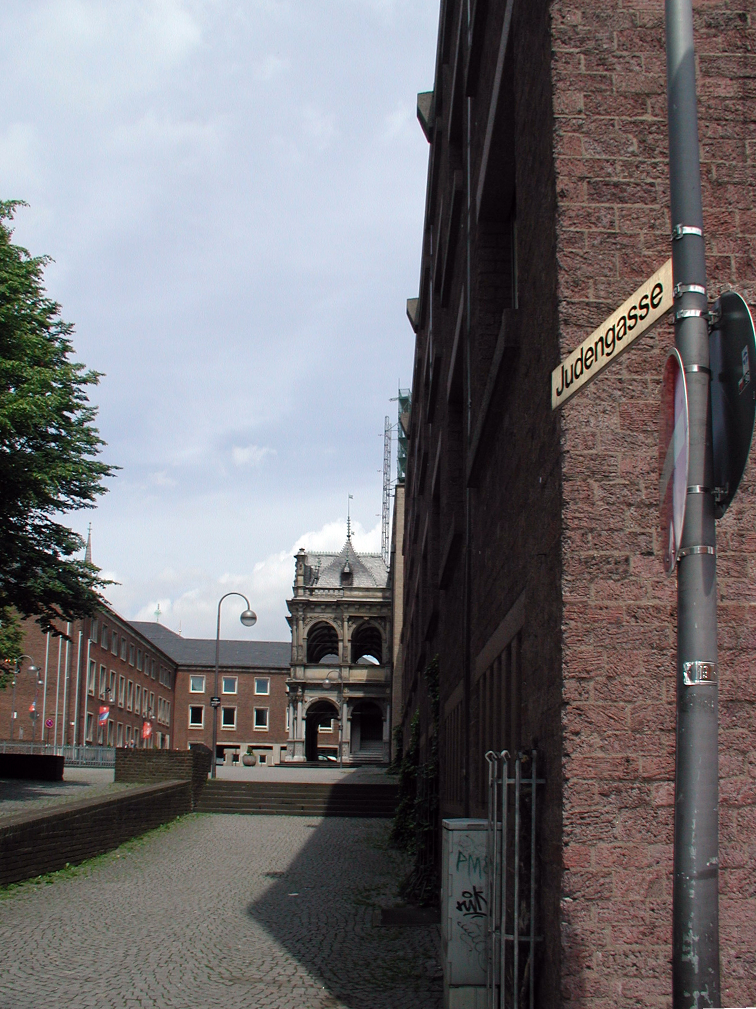 Köln Innenstadt, Judengasse am Rathausplatz